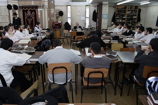 הרב חיים שלום דייטש מוסר שיעור בישיבת תורת אמת